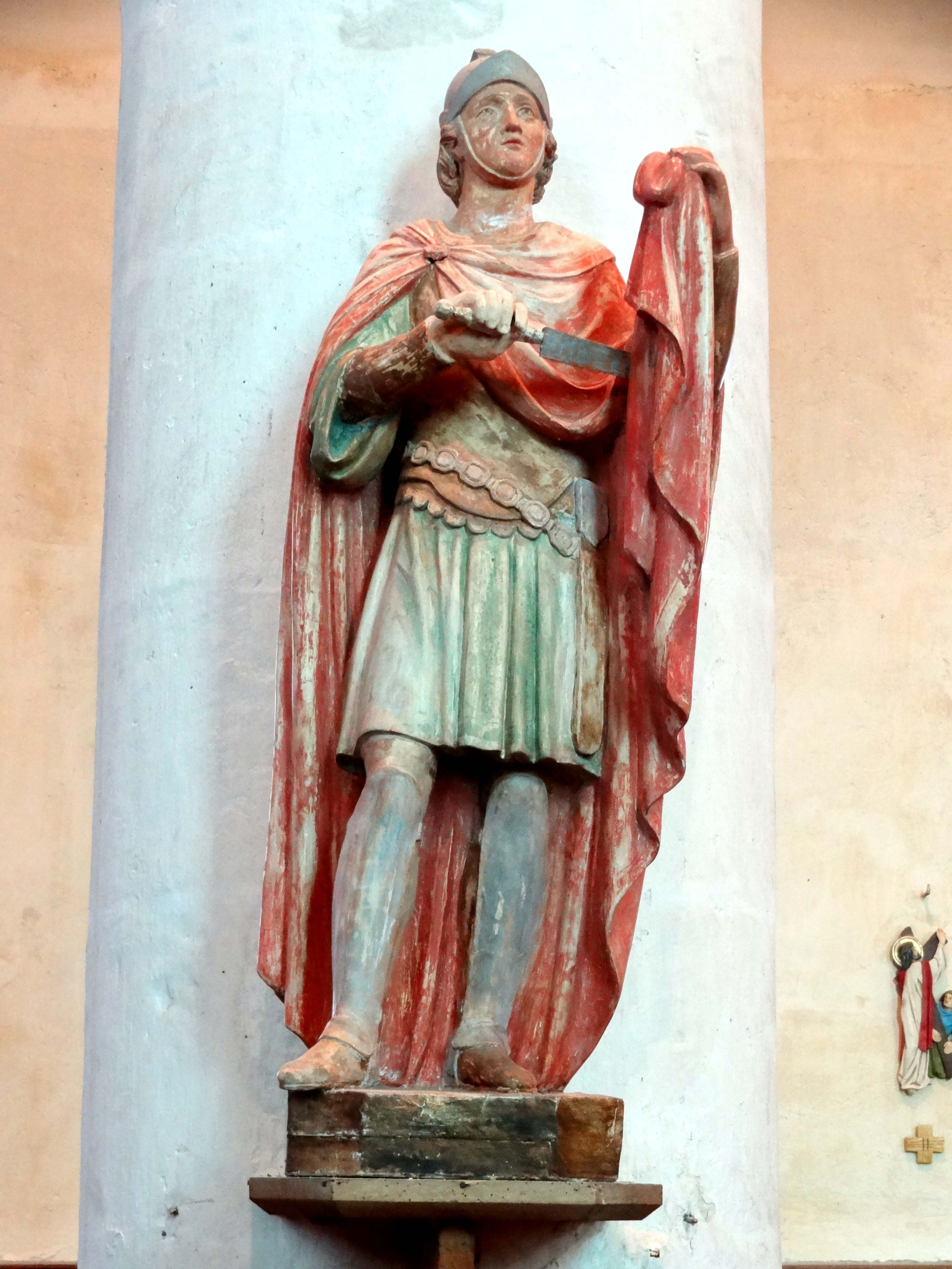 Mobilier de l'église - voir titre.